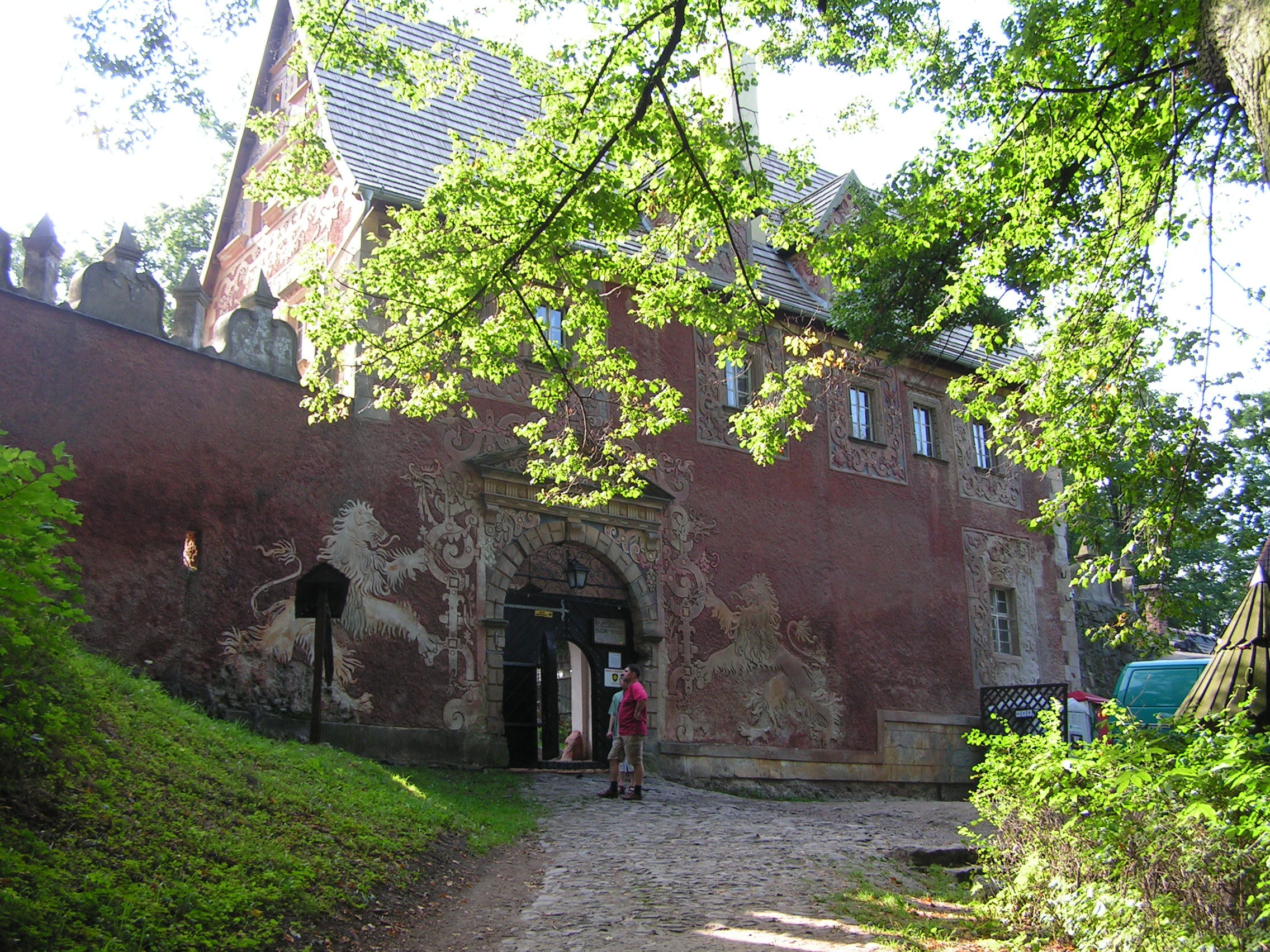 Zamek „Grodno” w Zagórzu Śląskim, widok na wejście do zamku.